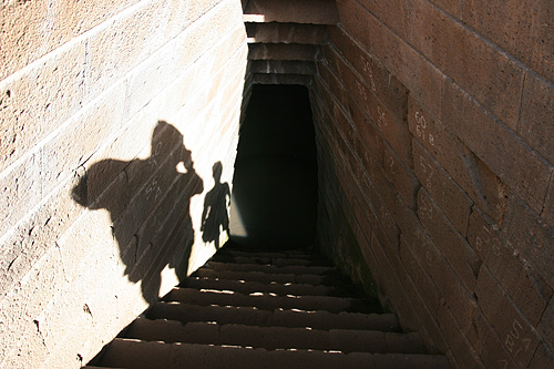 Own work. 3.10.2006